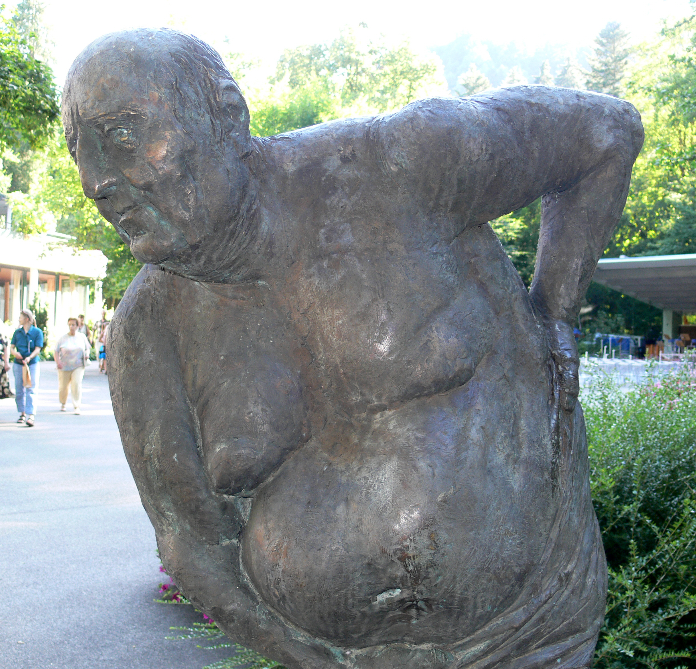 "Gioacchino Rossini, Heilung suchend 1856 in Bad Wildbad", von Karl-Henning Seemann, 1998–2000; Guss: Kunstgießerei Strassacker, Süßen; aufgestellt im Kurpark Bad Wildbad (2009 umgesetzt und seitdem vor dem Palais Thermal aufgestellt)